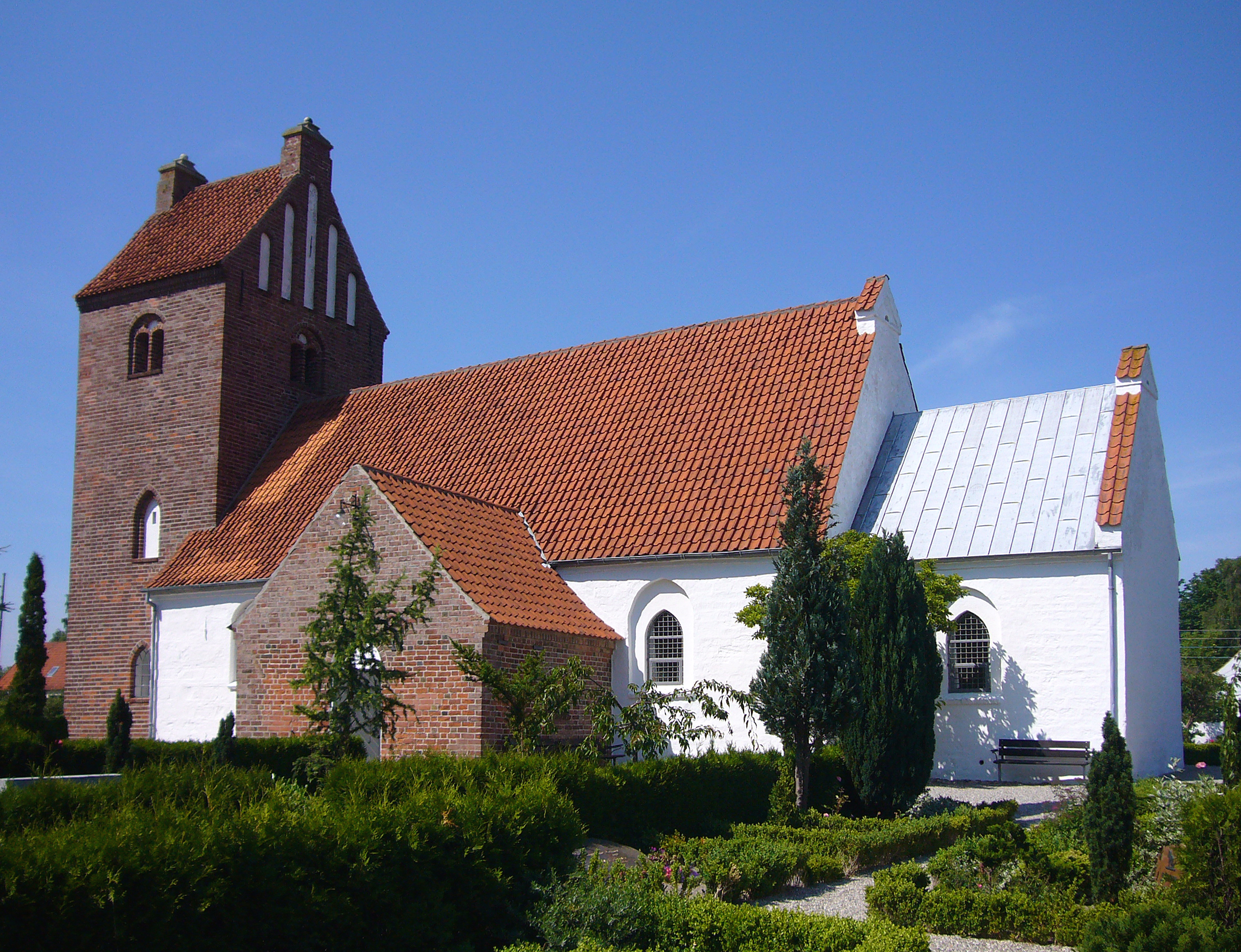 Tune Kirke, Roskilde County, Denmark